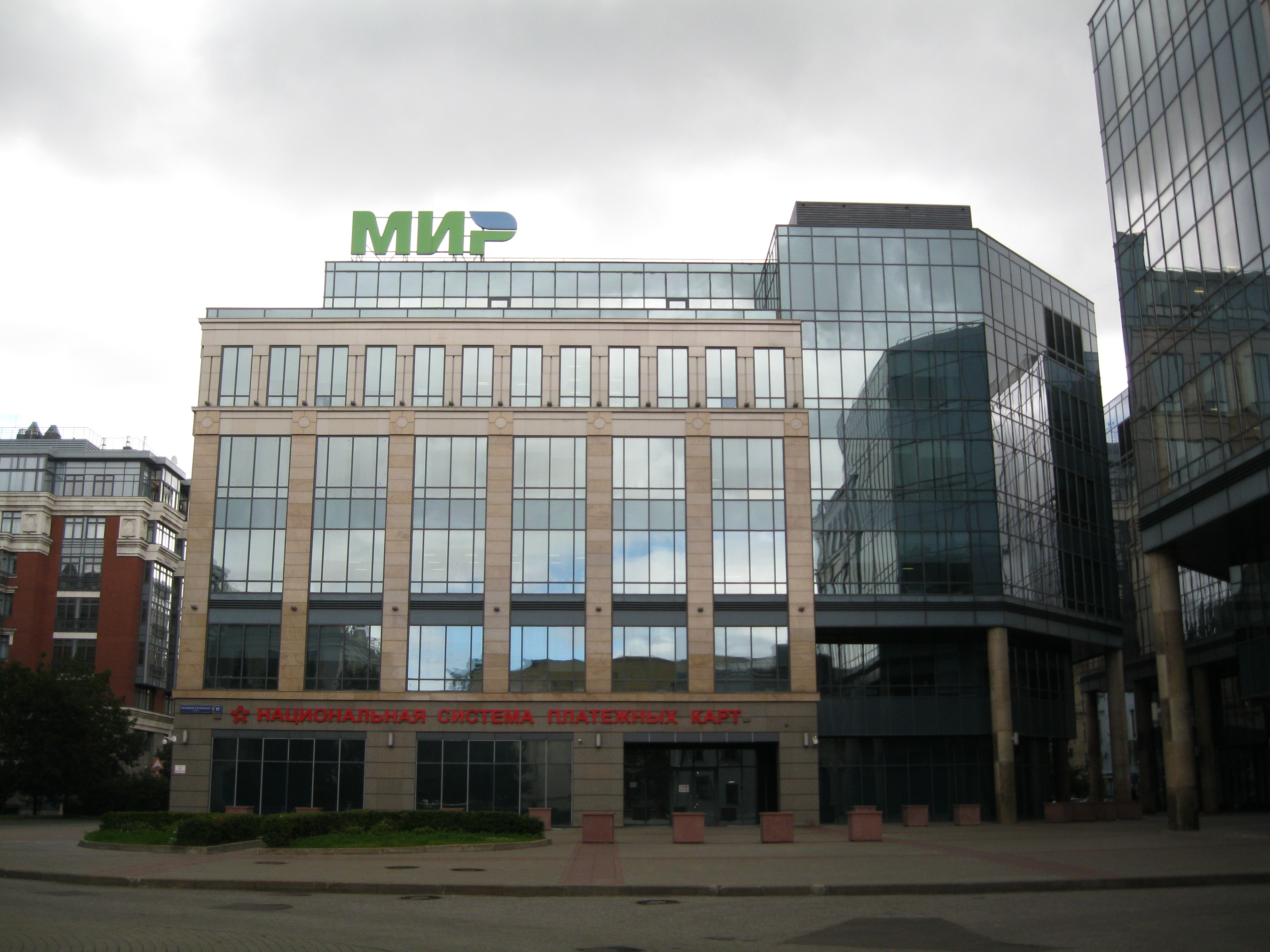 Вид здания Головного офиса Национальной системы платёжных карт в Москве